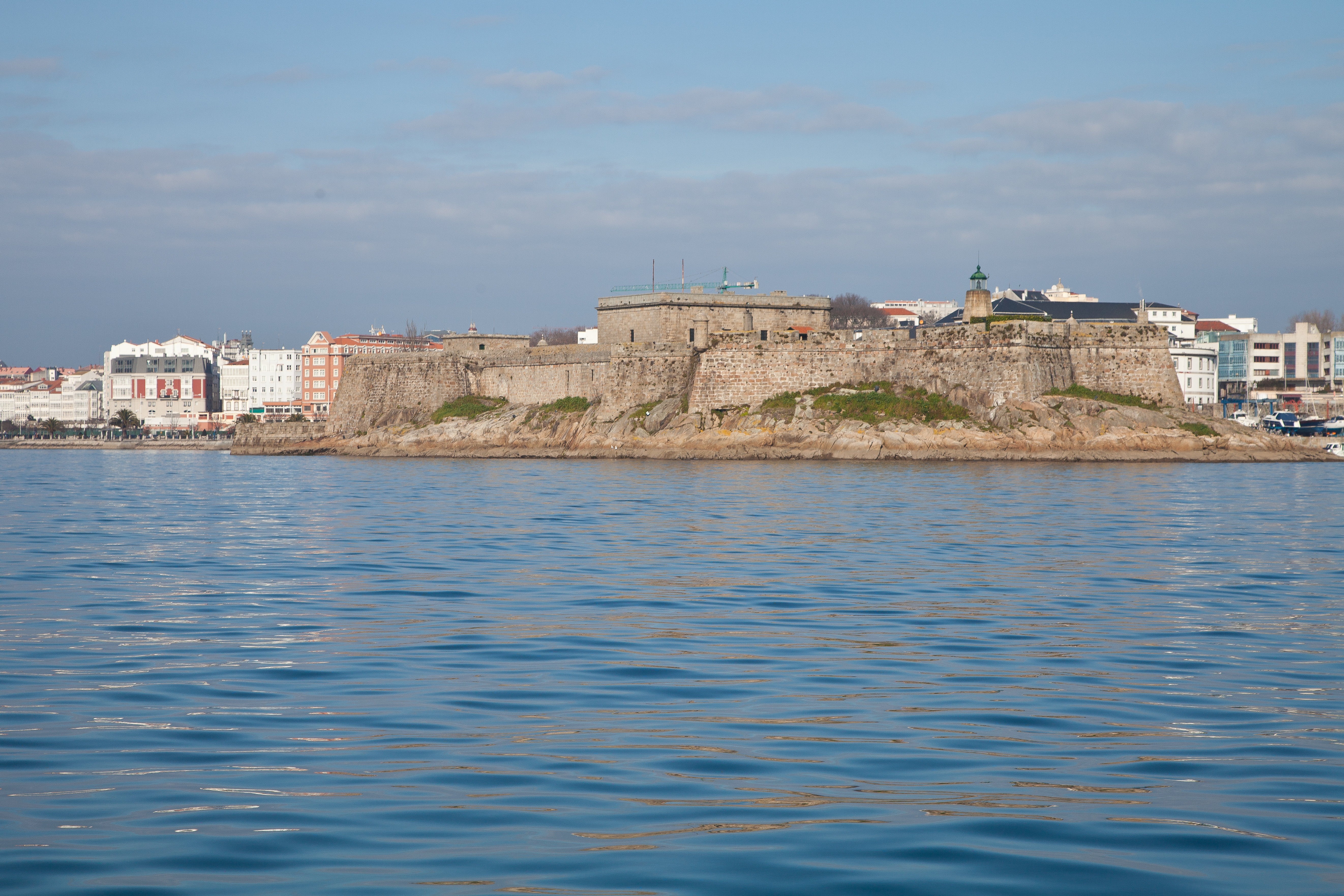 Castelo de San Antón